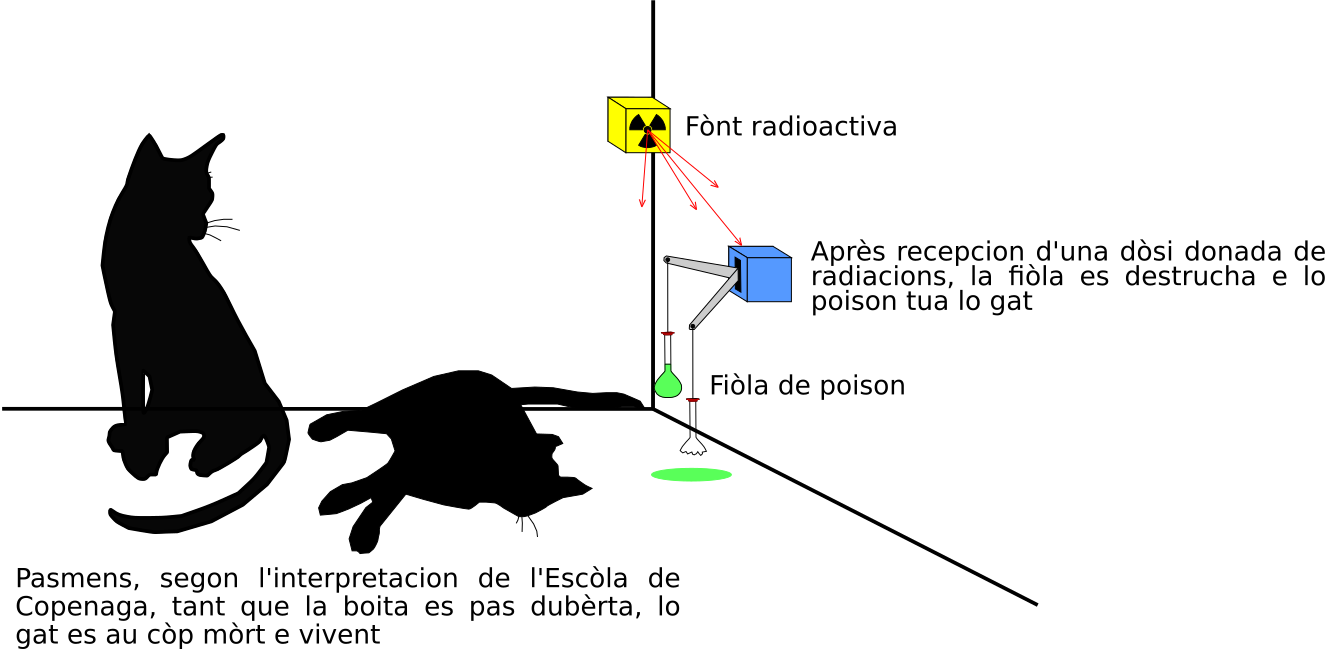 Descripcion de l'experiéncia dau gat de Schrödinger.